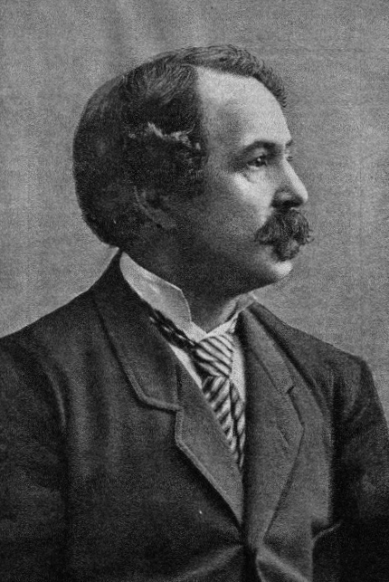 Demeter Diamanditi, österreichischer Alpinist, Eisläufer und Maler